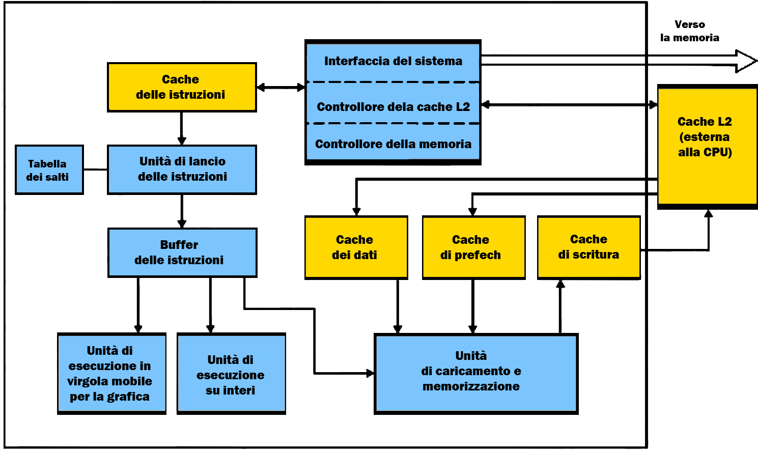 Schema grafico dell'architettura dell'UltraSPARC III